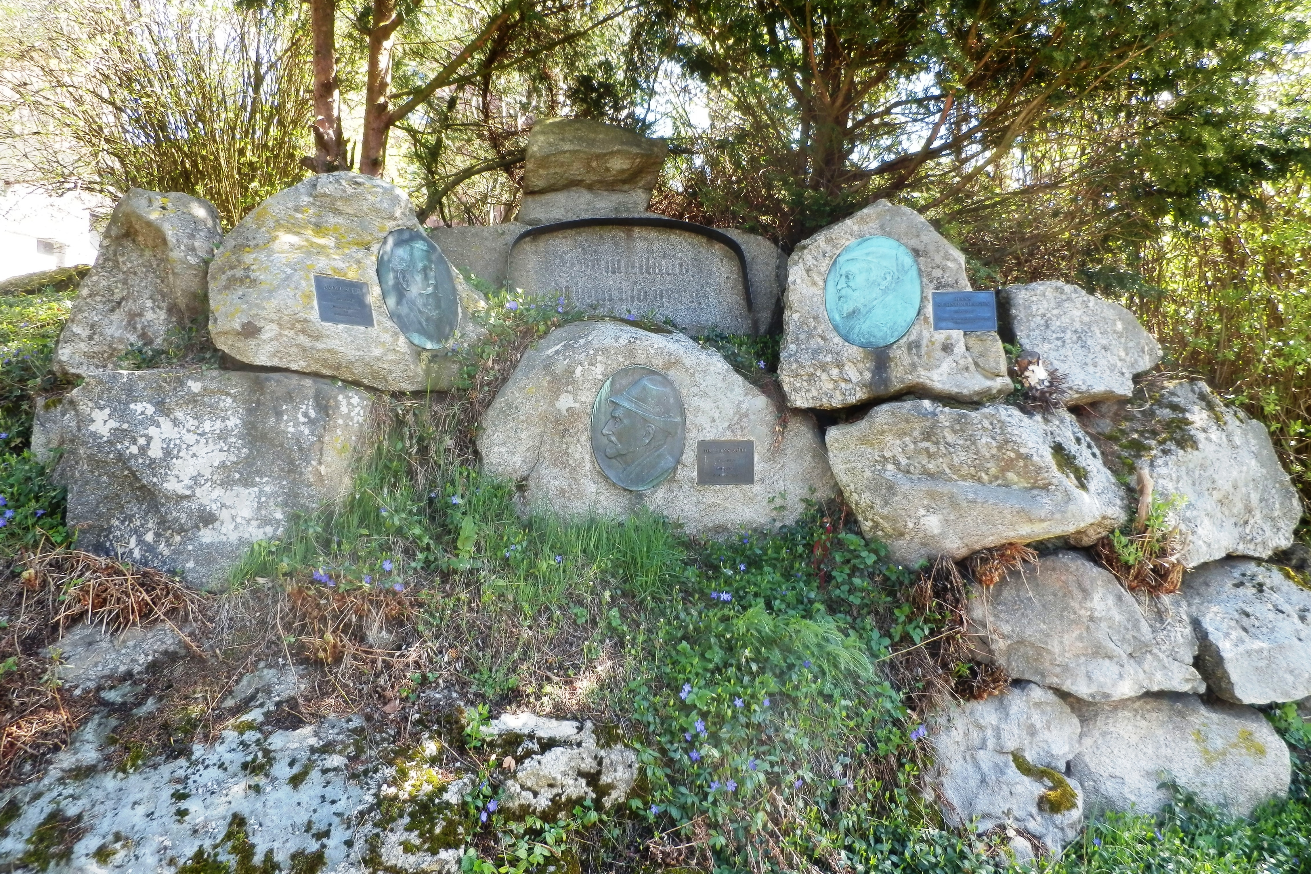 Schnopfhagendenkmal am Hansberg. Kopfreliefs von Hans Schnopfhagen, Hans Zötl und Adolf Seyrl, gestaltet von Adolf Wagner von der Mühl.